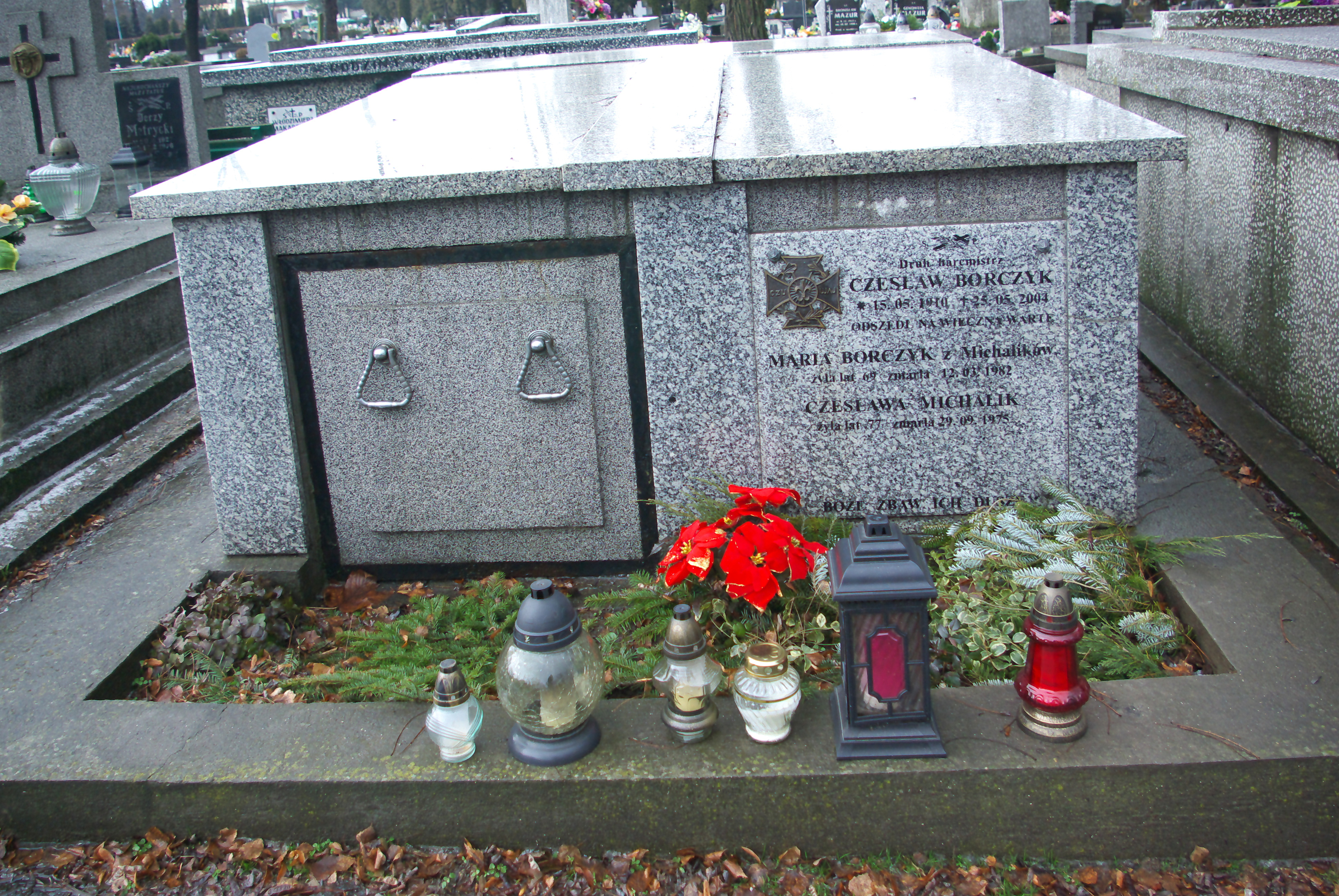 Grobowiec rodziny Borczyków w części „Matejki Stary” Cmentarza Centralnego w Sanoku.